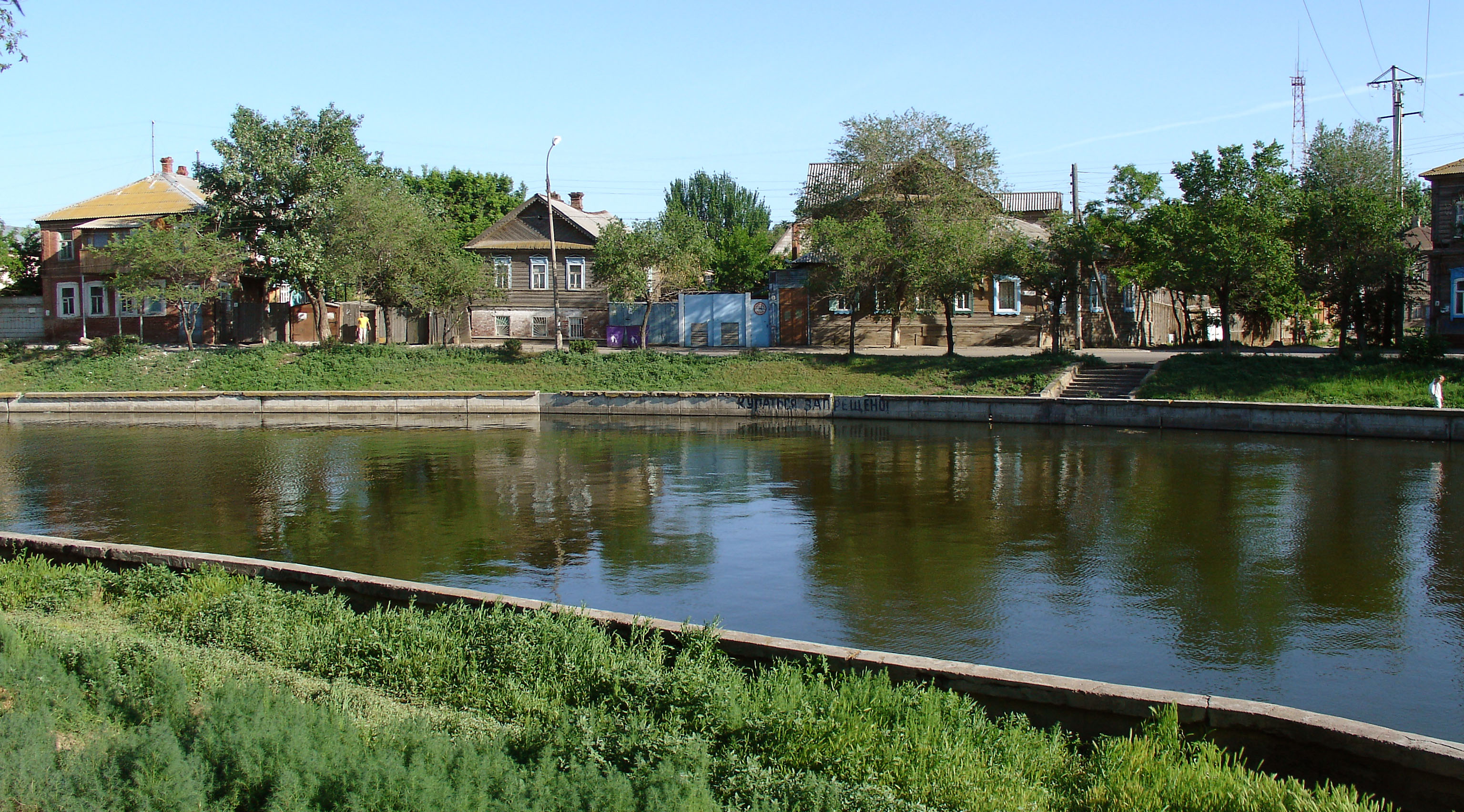 Astrakhan Canals